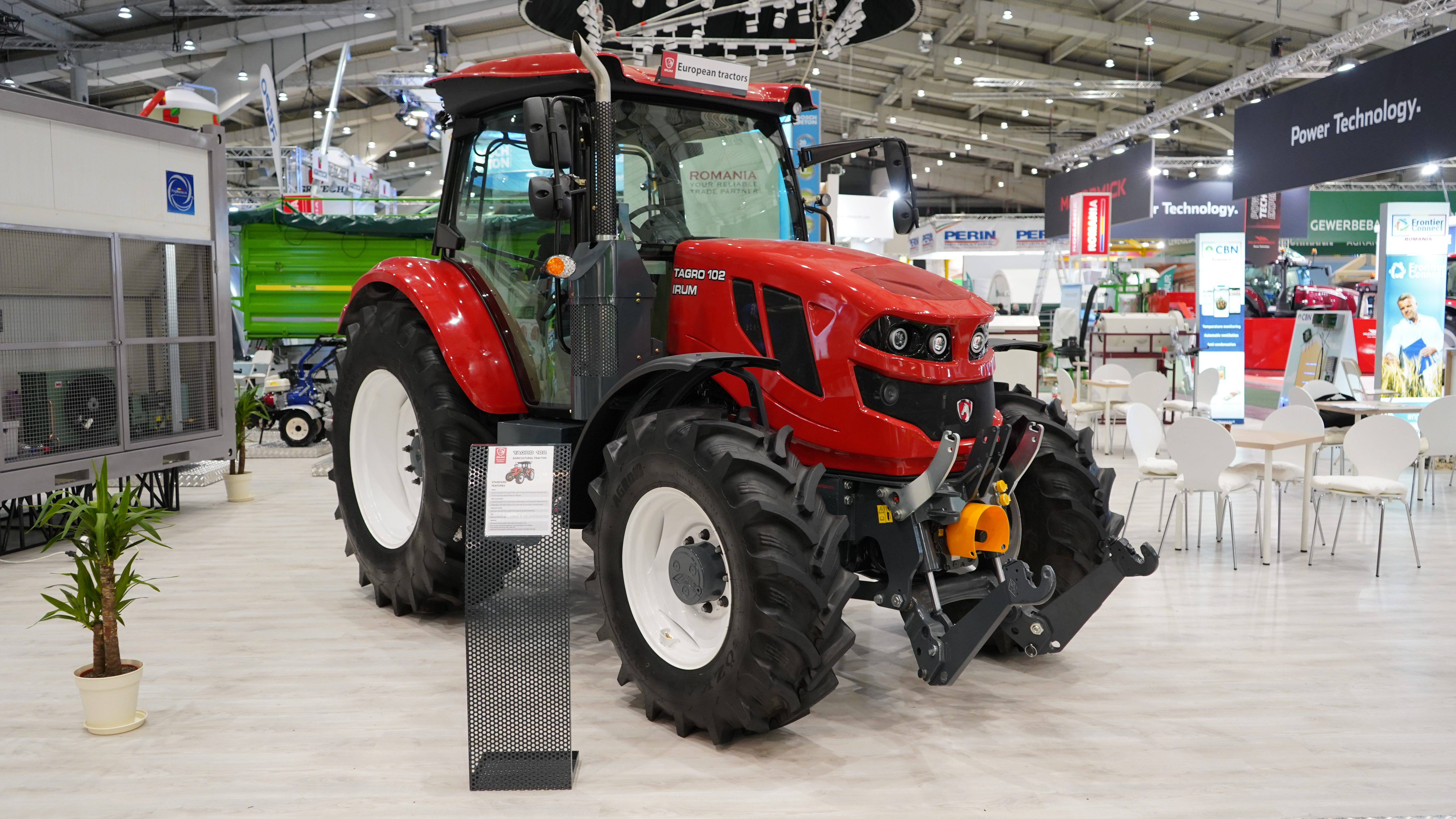 Schrägansicht der Front eines IRUM Tagro 102, ausgestellt auf der Agritechnica 2019.